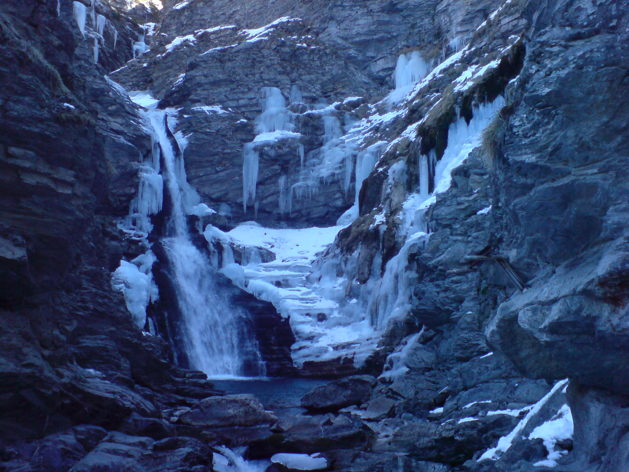 Description Vue de la cascade que forme la rivière Lance, à proximité de la ville de Colmars Datevoir métadonnéesSourceOwn work by the original uploaderAuthorÉpiméthée Vue de la cascade que forme la rivière Lance, à proximité de la ville de Colmars